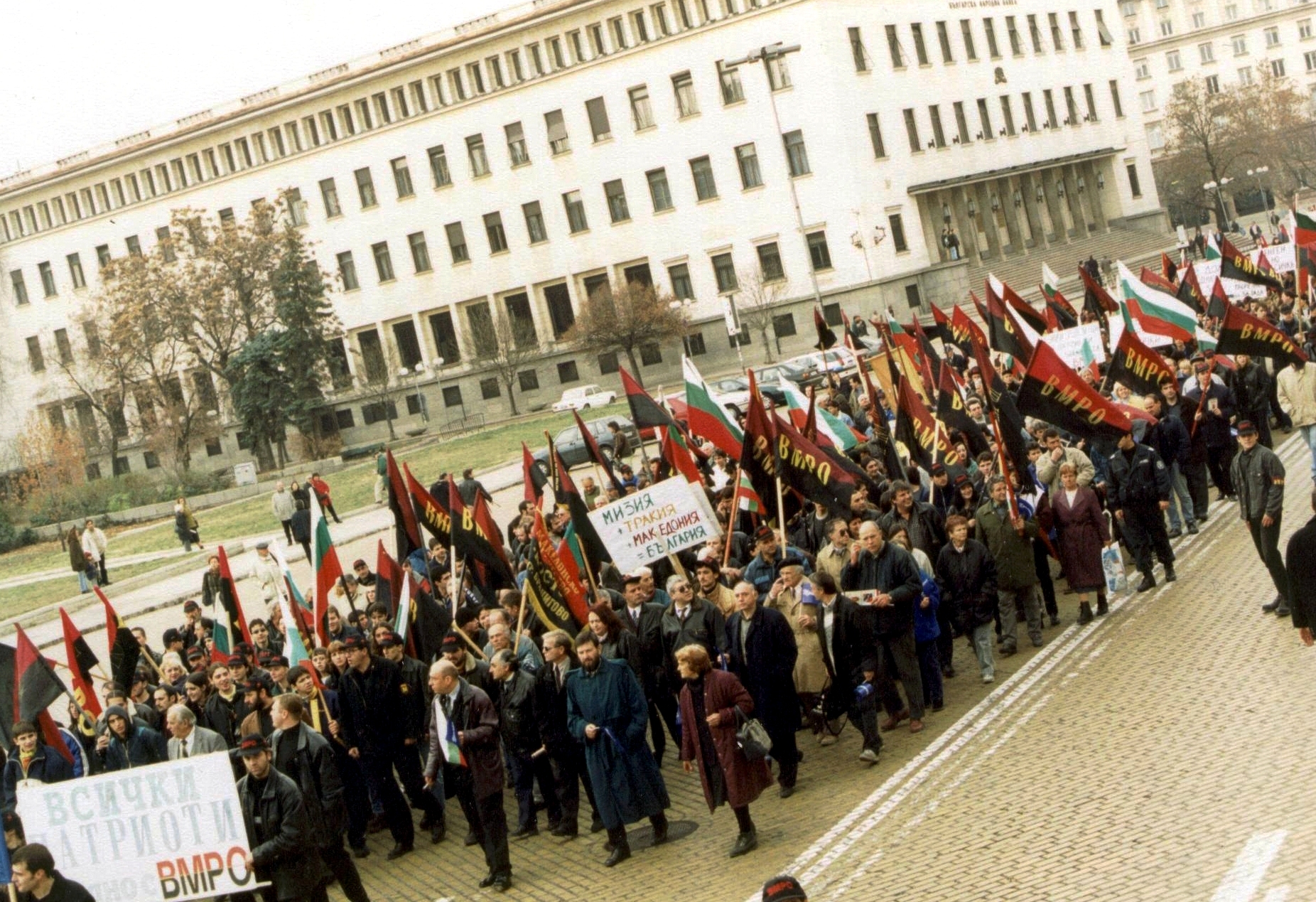 Протестно шествие на Организацията в София, 2003 г.; ВМРО /IMRO/